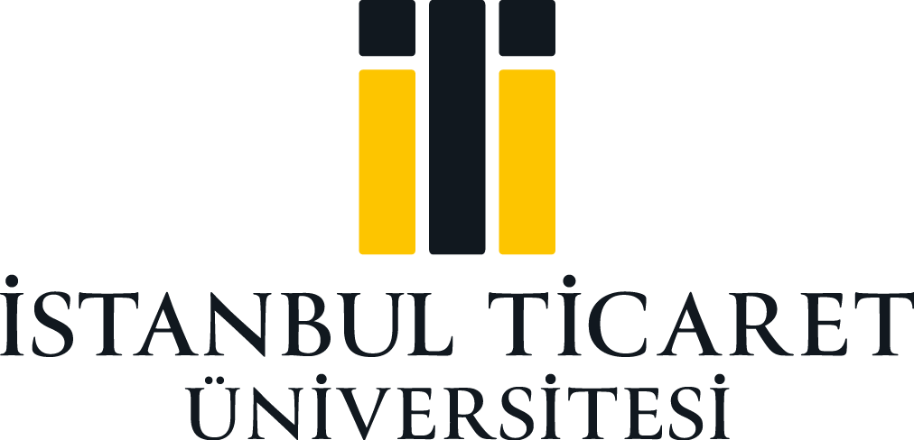 İstanbul Ticaret Üniversitesi Logo